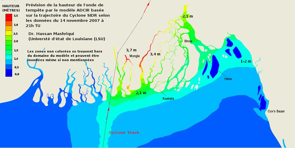 Prévision de l'onde de tempête selon le modèle du Dr. Mashriqui de L'université d'état de Louisiane faites quelques jours avant l'arrivée du cyclone Sidr et envoyée à la sécurité civile du Bangladesh afin de faire évacuer la population.